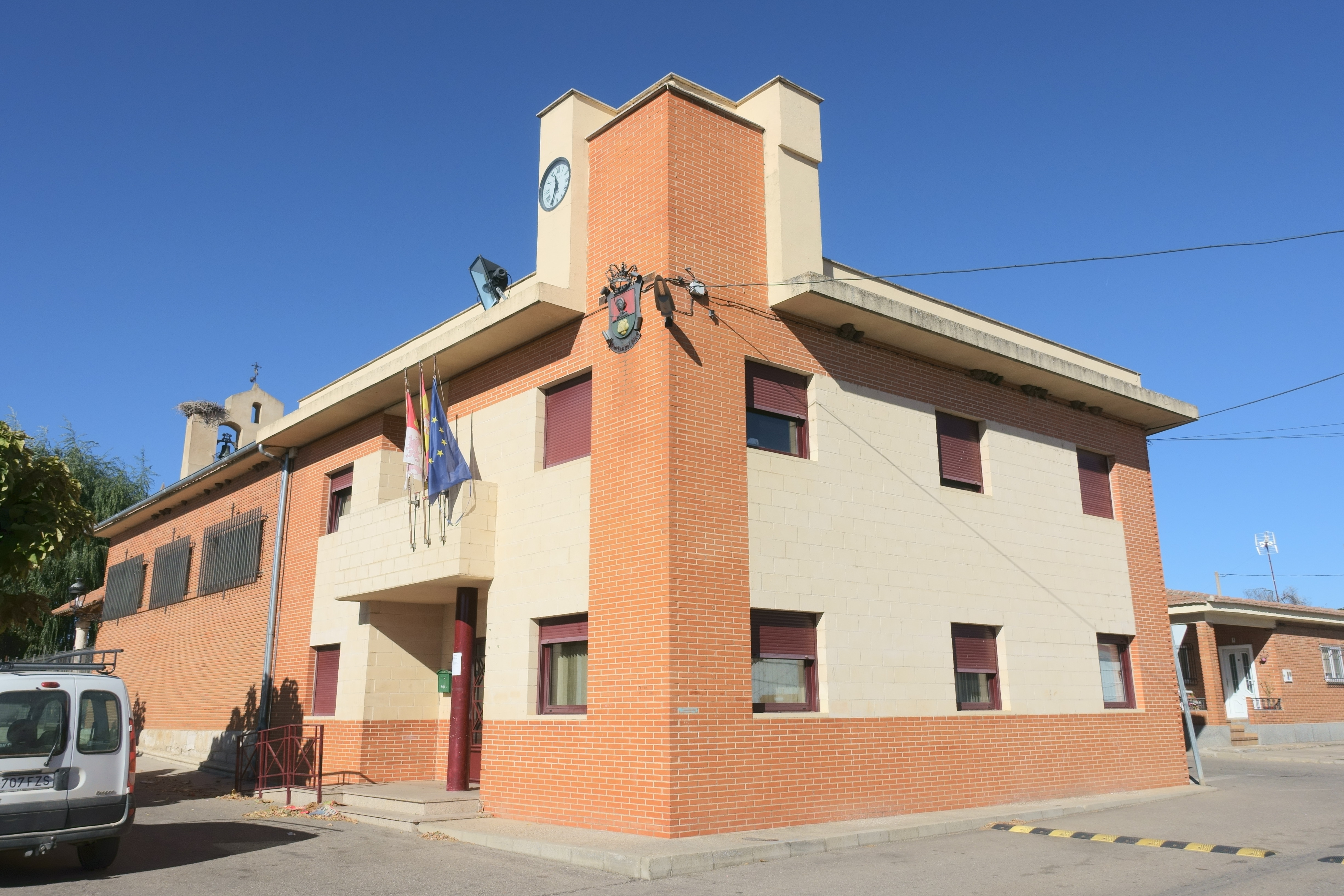 Casa consistorial de Roales del Pan (Zamora, España).